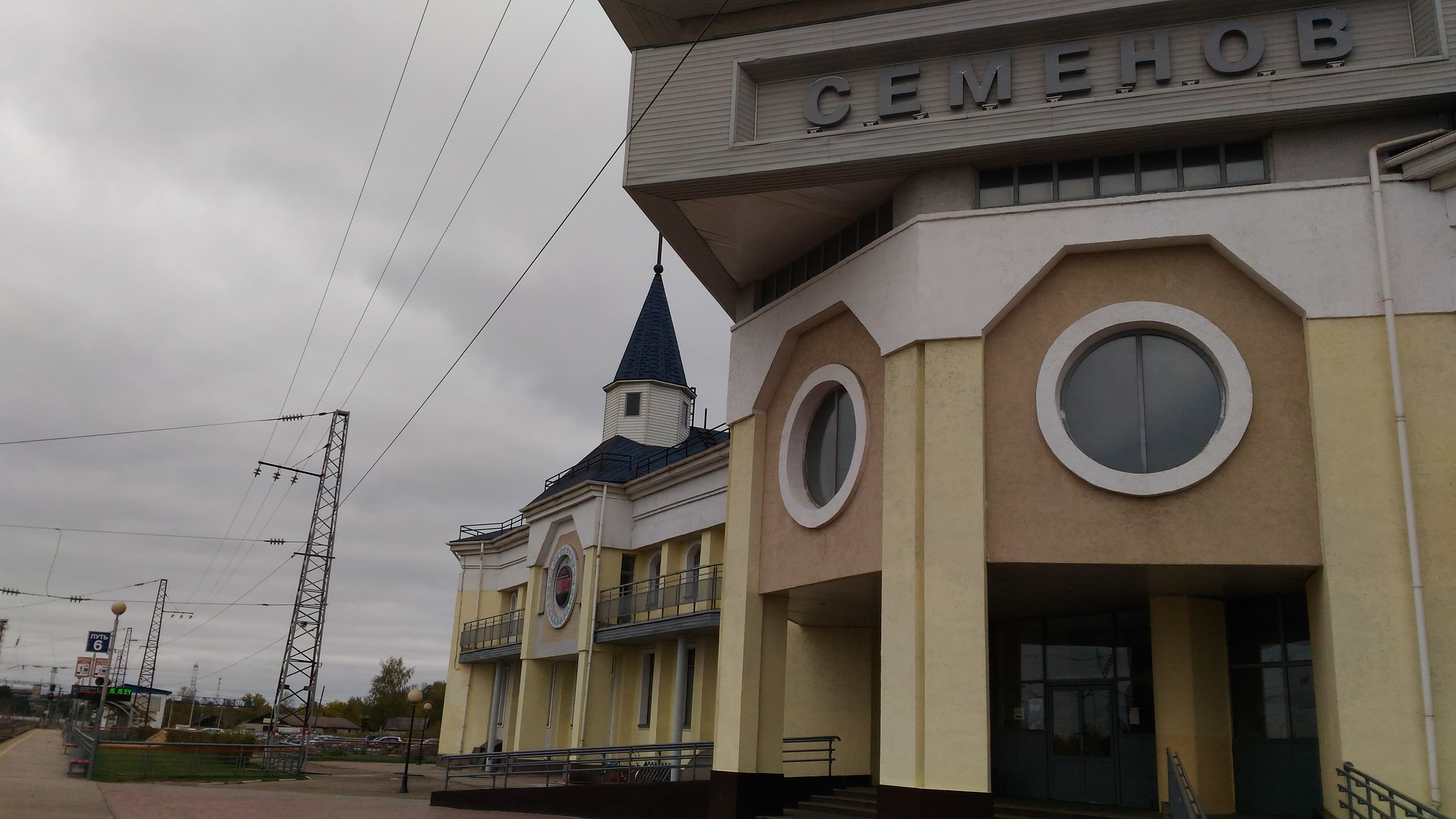 Город Семёнов. Вокзал